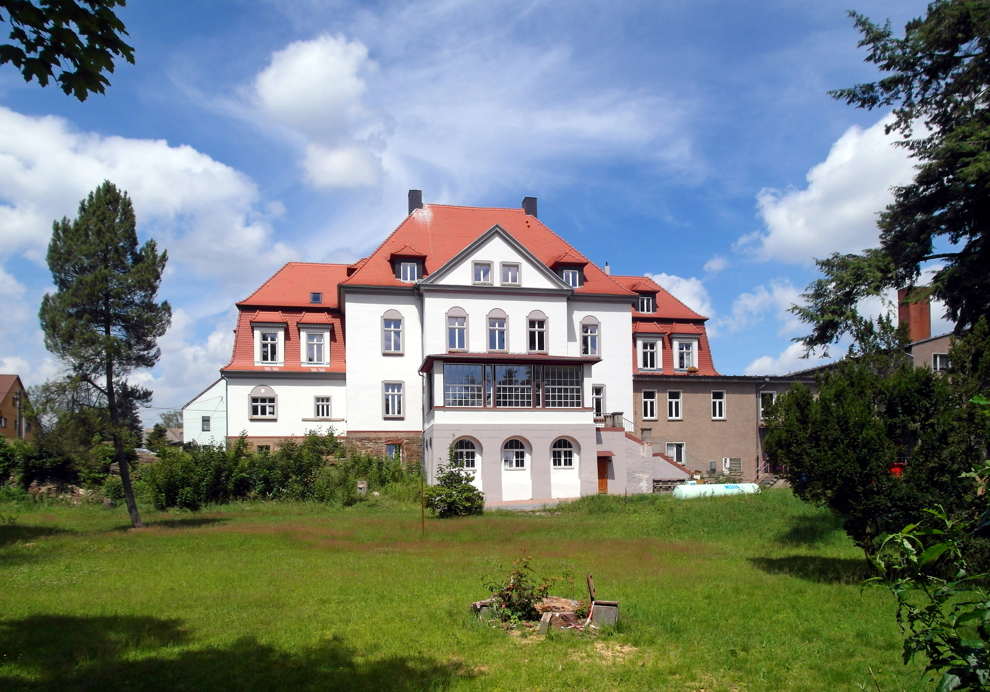 03.07.2017 09600 Wegefarth (Oberschöna): Rittergut Wegefarth, Herrenhaus, Talstraße 24 (GMP: 50.919875,13.243635). Errichtet wurde das Haus 1870. Der Fabrikanten Oskar Weidenmüller baute es 1926 in der heutigen Gestalt um. In der DDR war hier ein Kinderheim später ein Lehrlingswohnheim. 2015 saniert. Parkseite. [SAM0820.JPG]20170703500DR.JPG(c)Blobelt